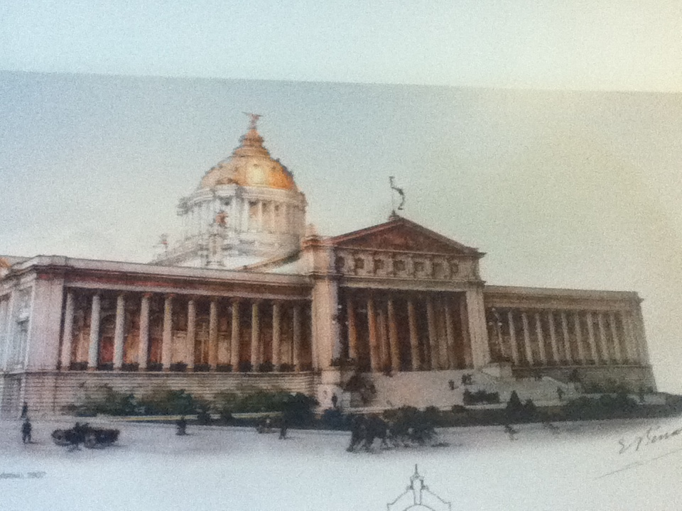 Dibujo original del proyecto ganador para construir la nueva sede del congreso a principios del S. XX